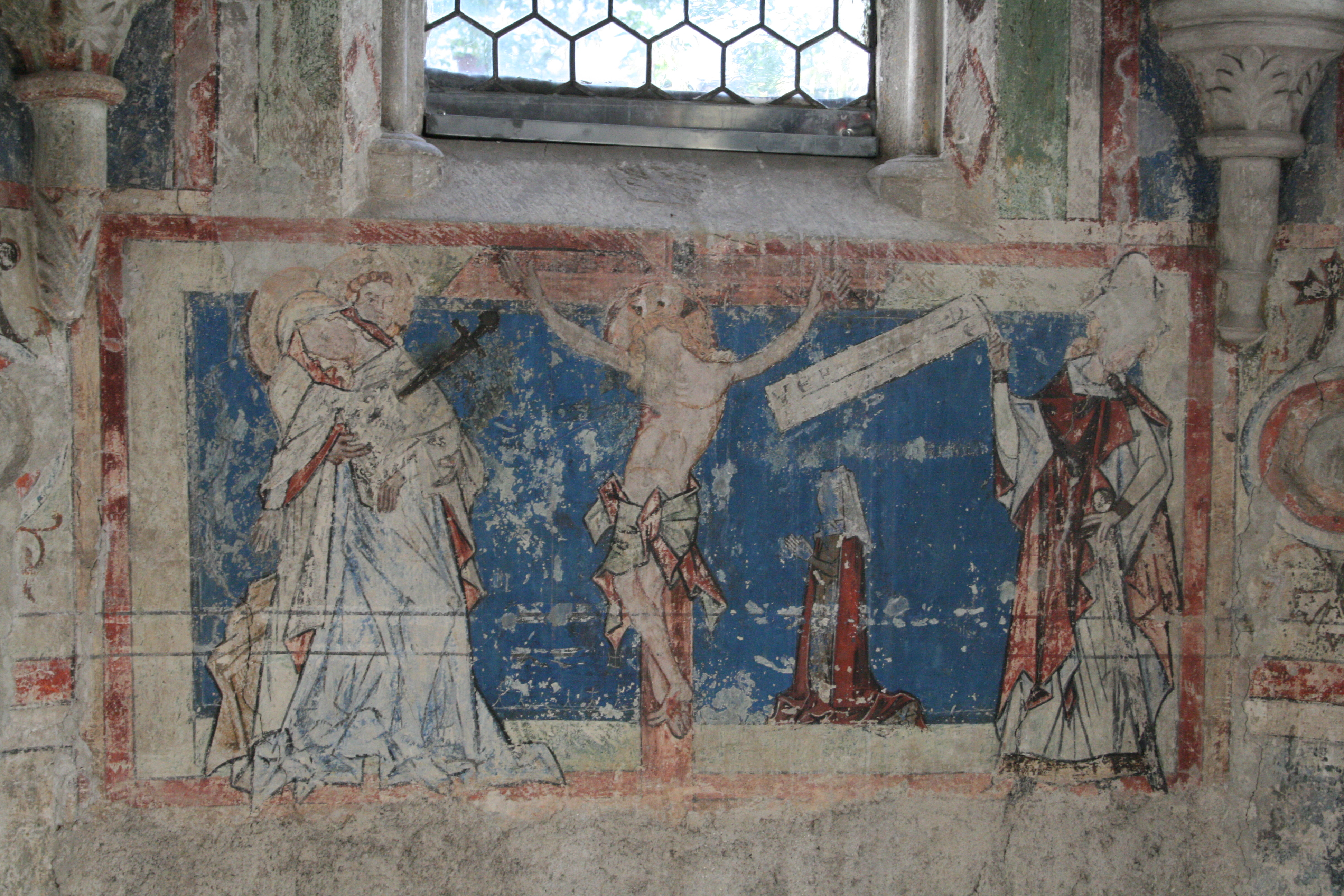 Stift Göss bei Leoben in der Steiermark, Österreich. Michaelskapelle.